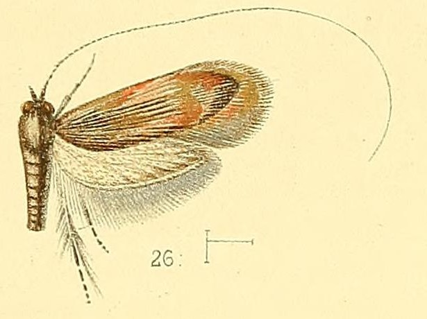 Nemophora humilis